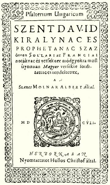 Szenczi Molnár Albert Zsoltároskönyve